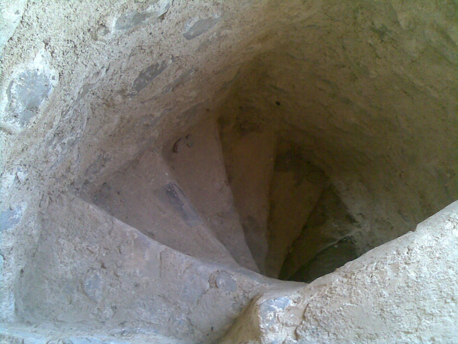 نمای مقبره علامه شهرستانی